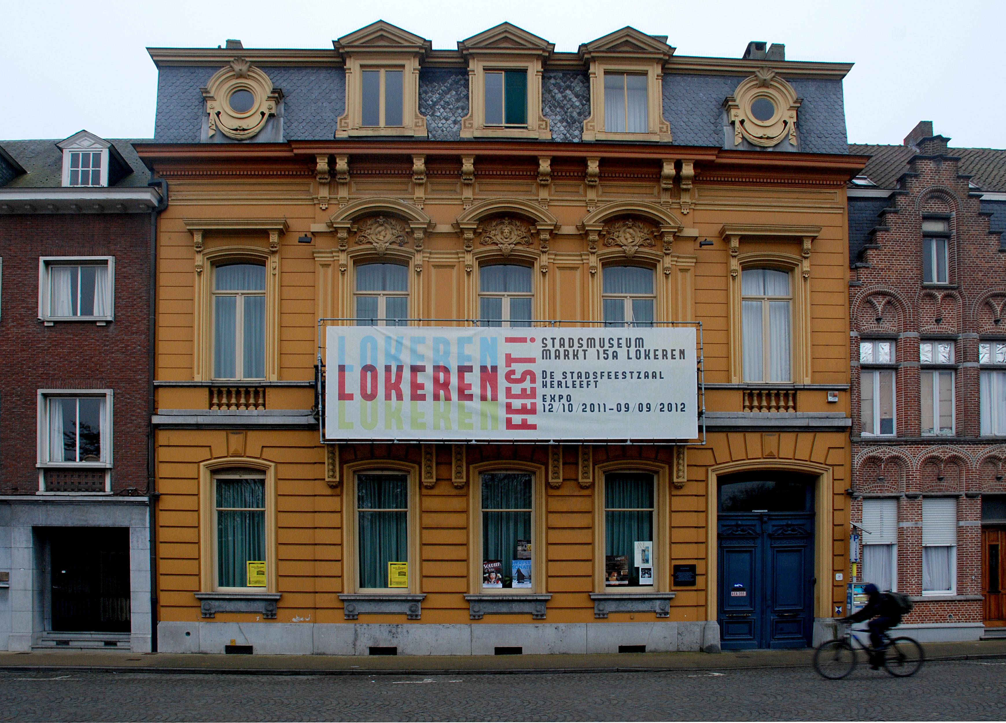 Lokeren onroerend erfgoed ID 18002